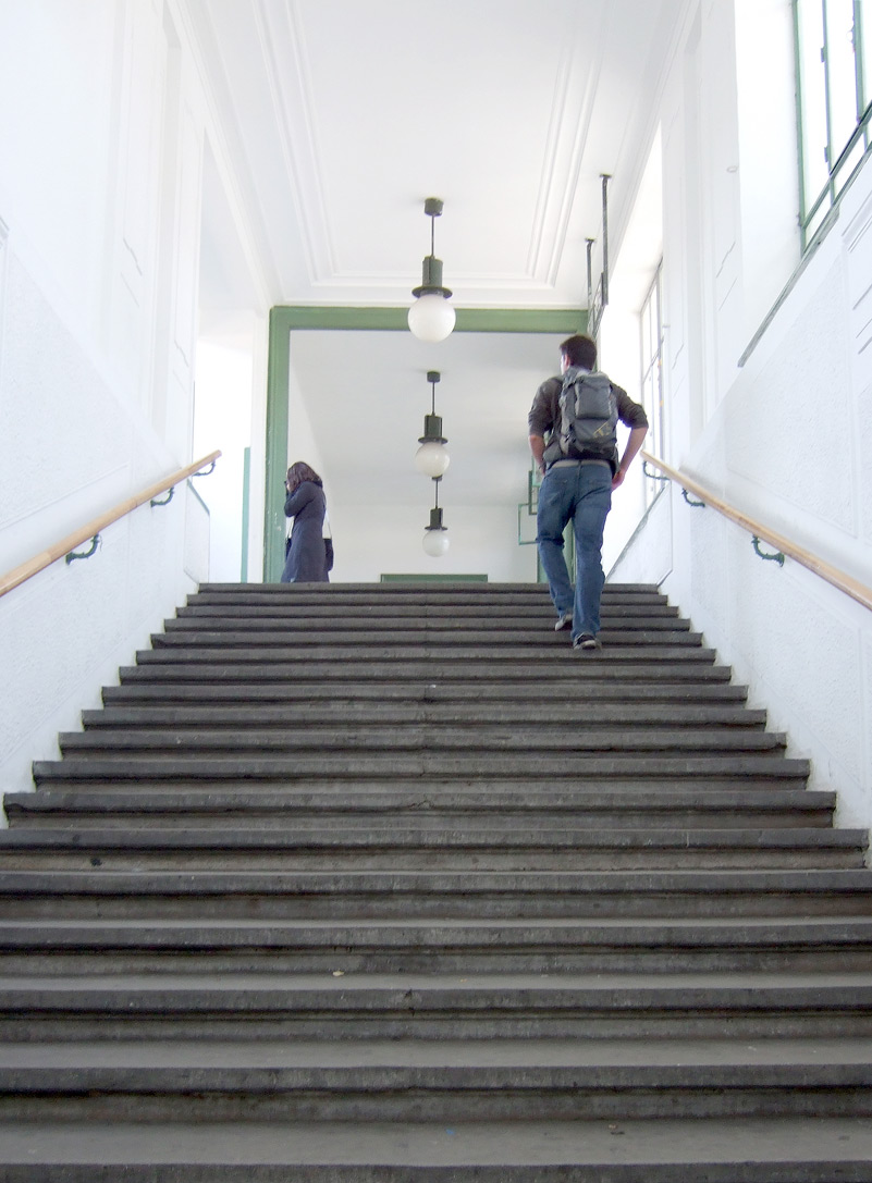 Stiegenaufgang der Station Währinger Straße/Volksoper der Linie U6 der Wiener U-Bahn / Stairway of subway-station Währinger Straße/Volksoper; line U6, Vienna underground